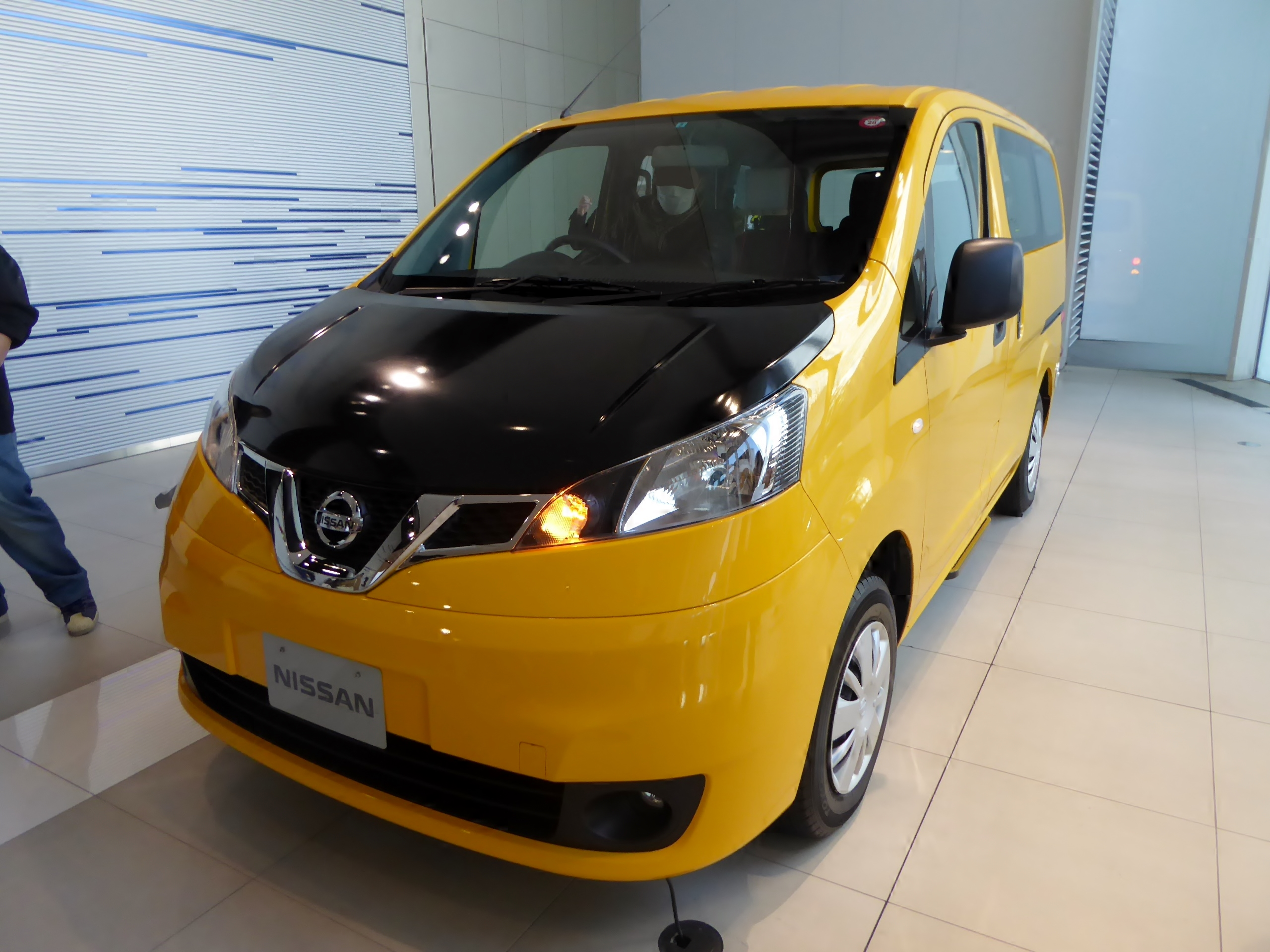 『さらば あぶない刑事』仕様のDBA-M20型日産・NV200タクシーを撮影。